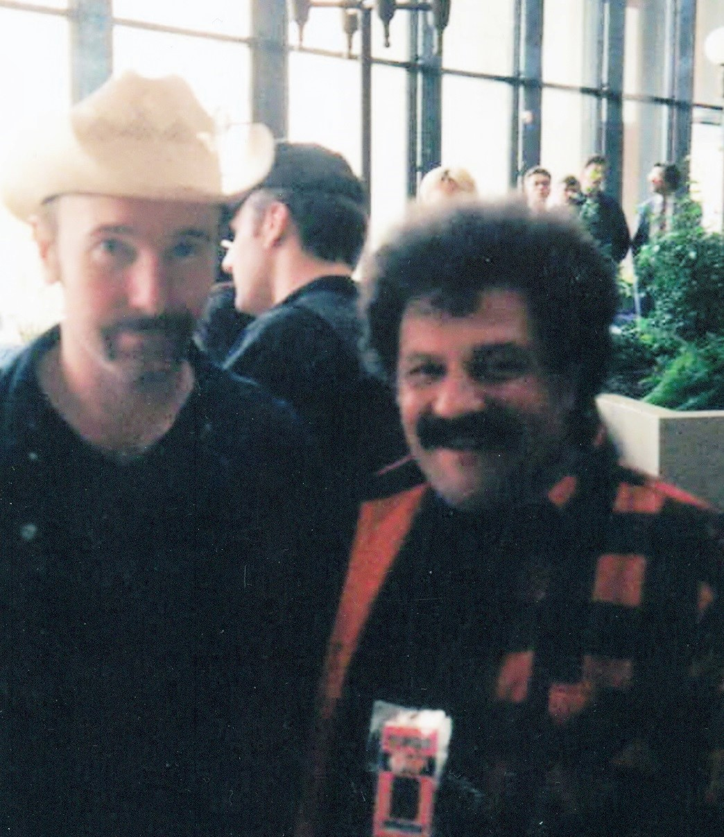 Gitarista grupe U2 "The Edge" i Želimir Altarac Čičak -23.09.1997. Sarajevo